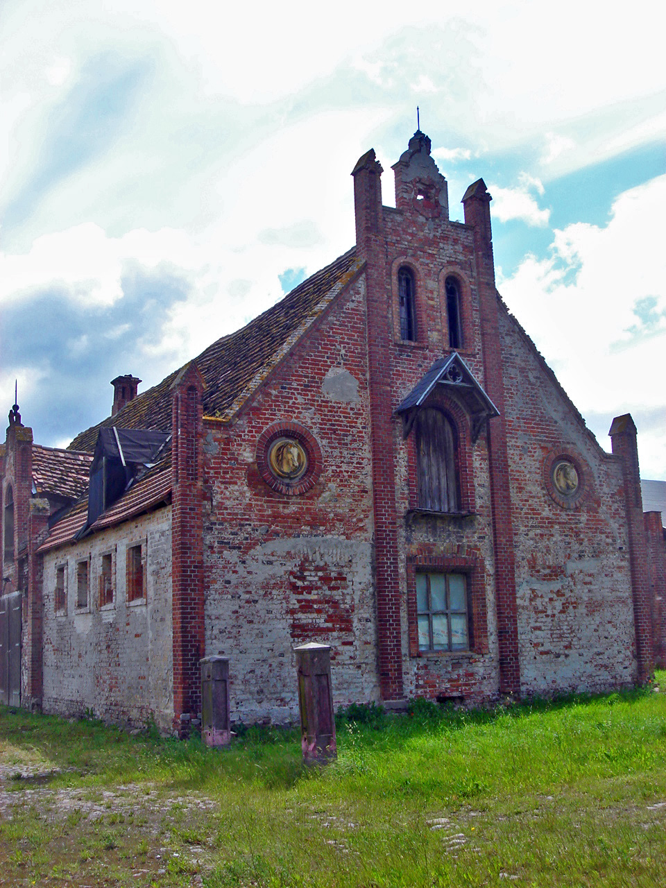 Der im Frühjahr 2009 noch unsanierte Marstall von Schloss Broock.